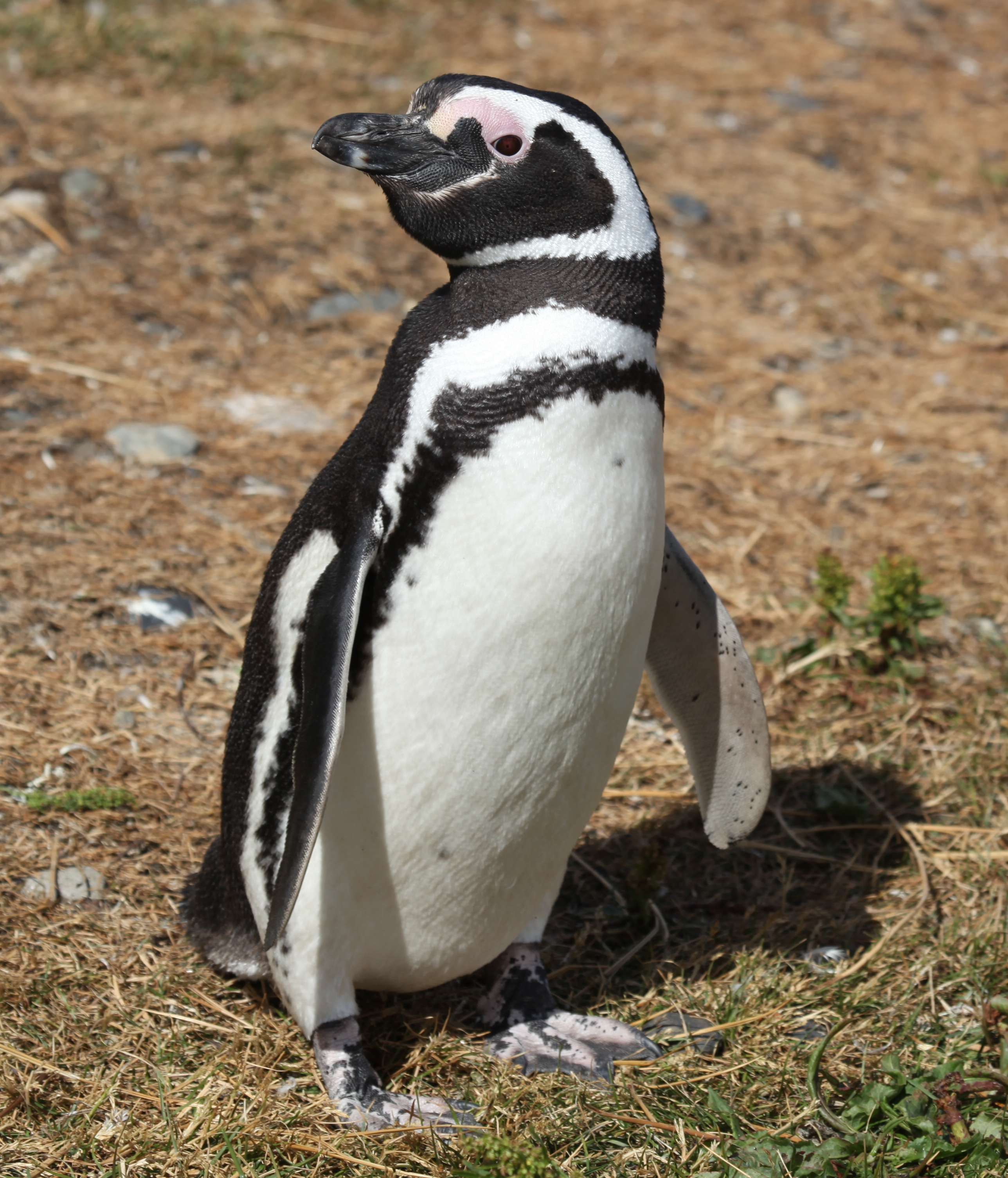 At Isla Martillo in Tierra del Fuego, Argentina.